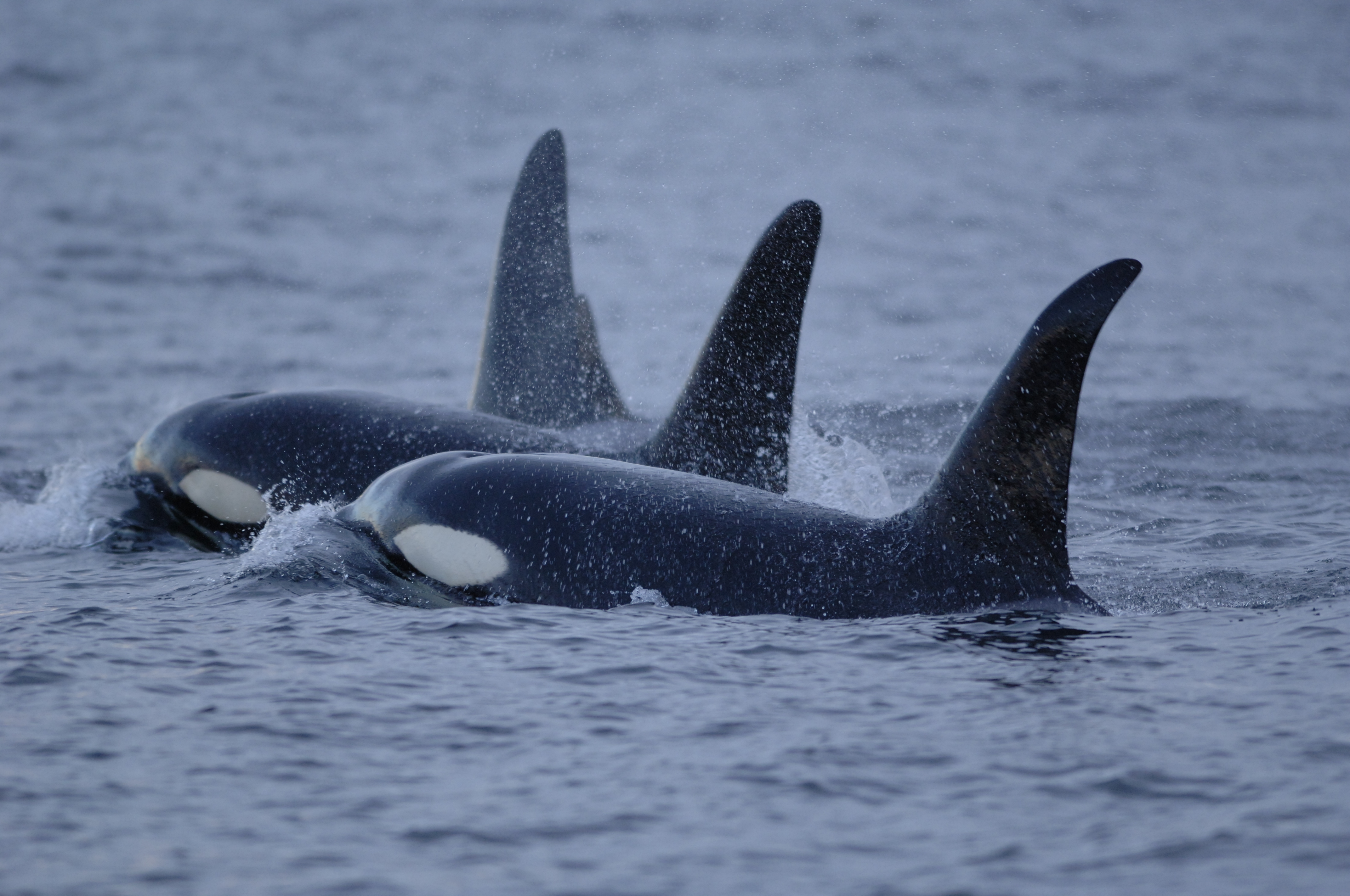 anim1102